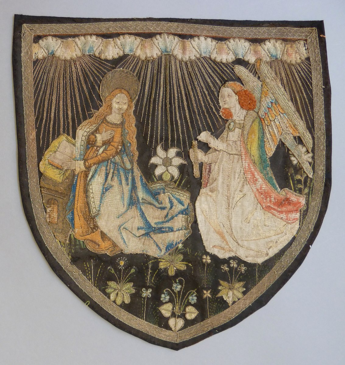 Aankondiging van de geboorte van Jezus Zuid-Nederland, ca. 1470-1480 ABM t2128 Verrast kijkt Maria op van haar gebedenboek. De engel Gabriël vertelt haar dat ze een heel bijzonder kind zal krijgen. Dit moment wordt ook wel annunciatie genoemd, de aankondiging. ‘Je zult zwanger worden en een zoon baren, en je moet hem Jezus noemen. Hij zal een groot man worden en Zoon van de Allerhoogste worden genoemd’ (Lucas 1). Tussen Maria en de engel staat een witte lelie als symbool van Maria’s reinheid. Dit verfijnd geborduurde schild sierde ooit de achterzijde van een koorkap.